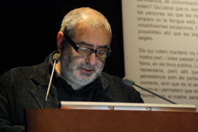 Santi Santamaria a la clausura de les 12 hores de Lectura Continuada de Josep Pla el dia de Sant Jordi de 2009 a Palafrugell.